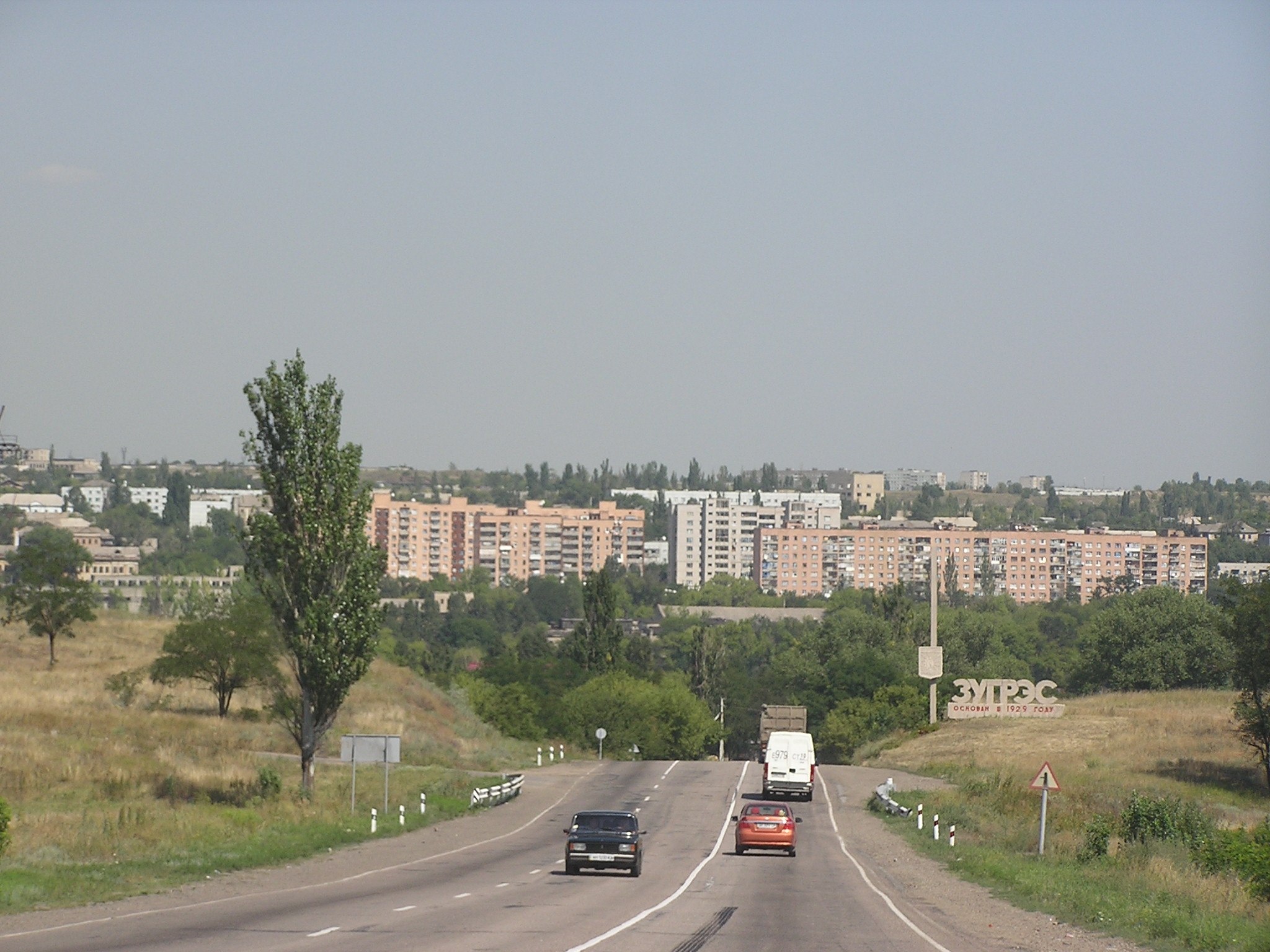 Въезд в Зугрэс со стороны Харцызска